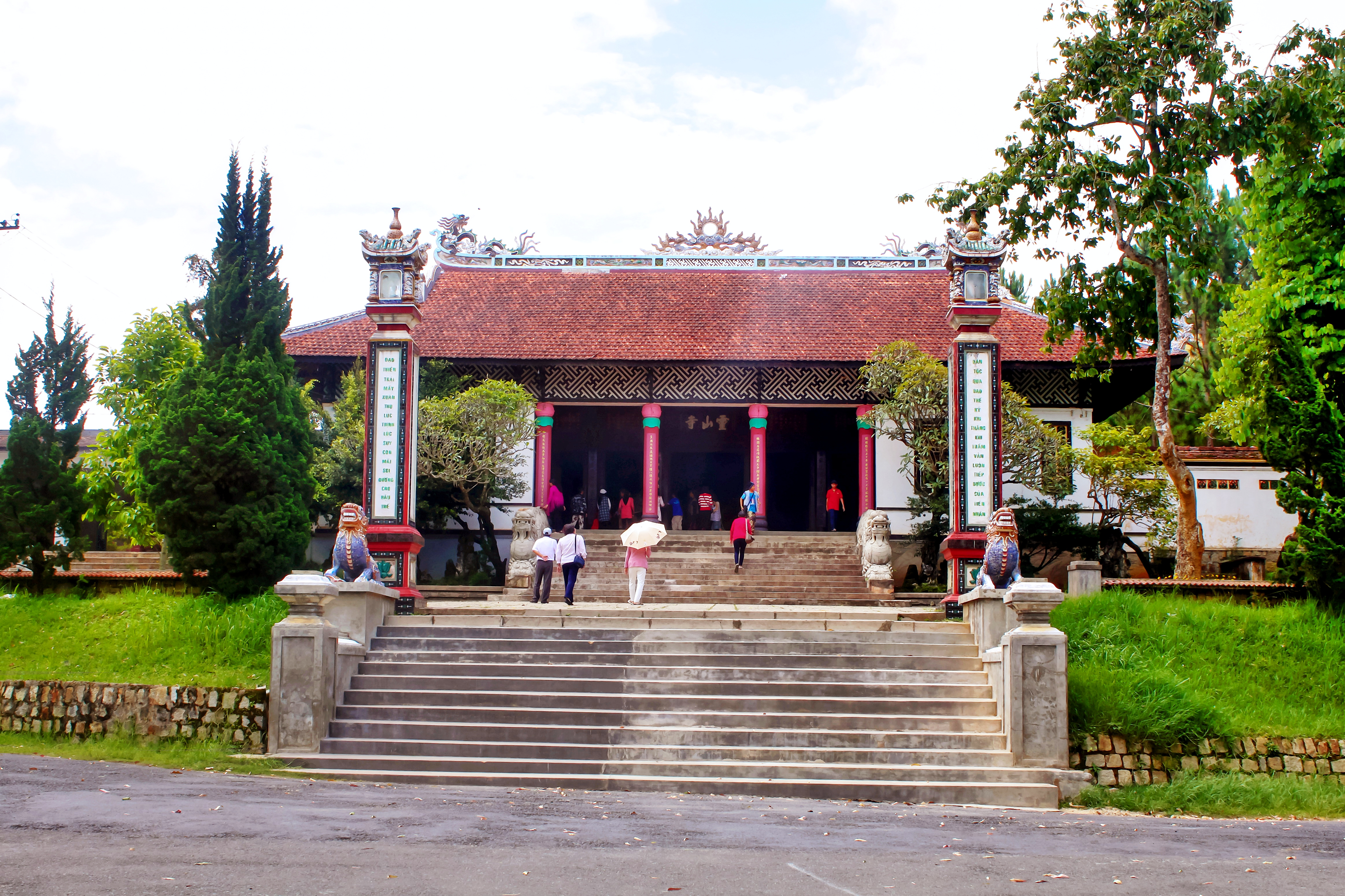 Chính điện chùa Linh Sơn ở gần trung tâm TP Đà Lạt, Việt Nam.